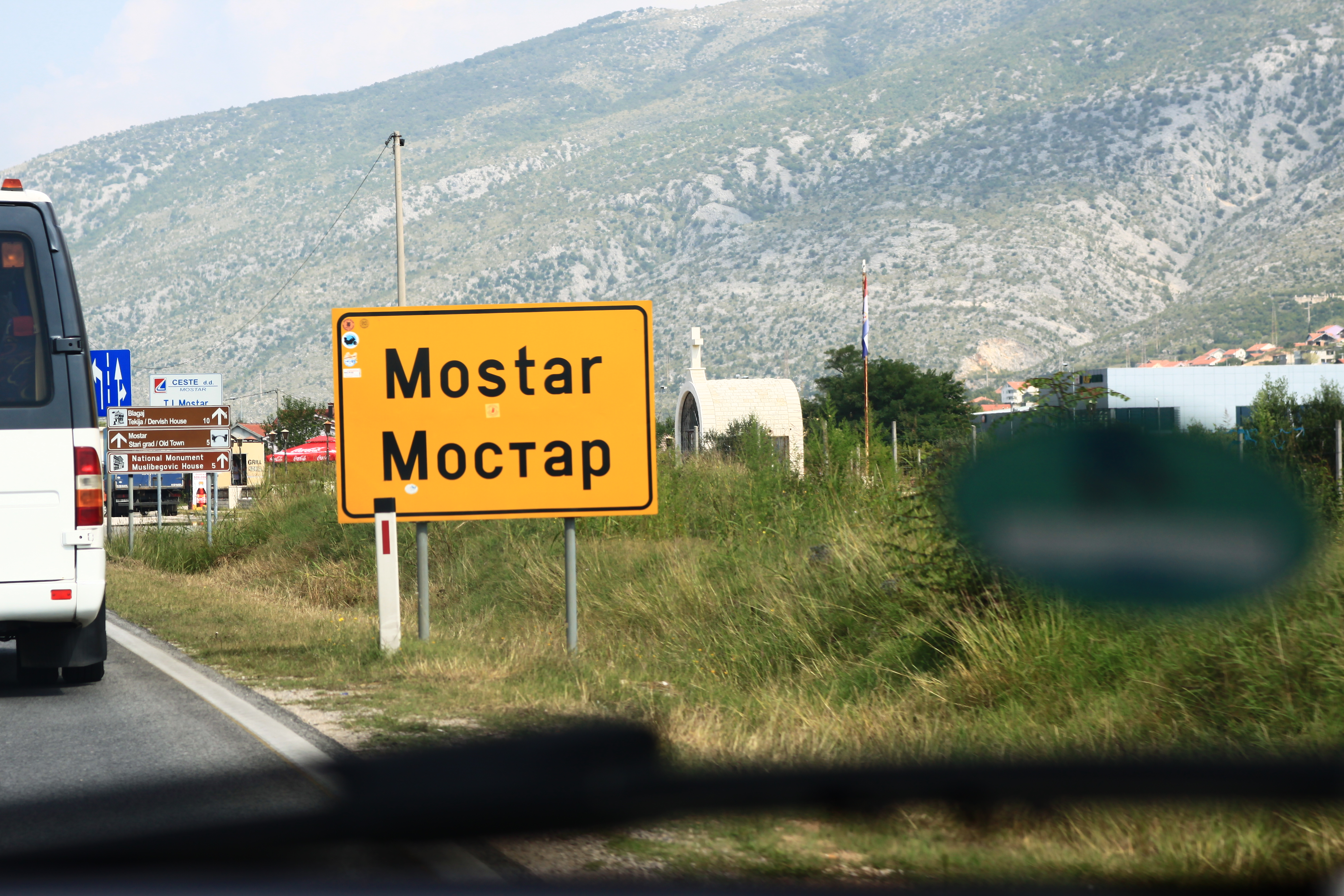 Ortseingangstafel von der bosnischen Stadt Mostar. In lateinischer und kyrillischer Schreibweise